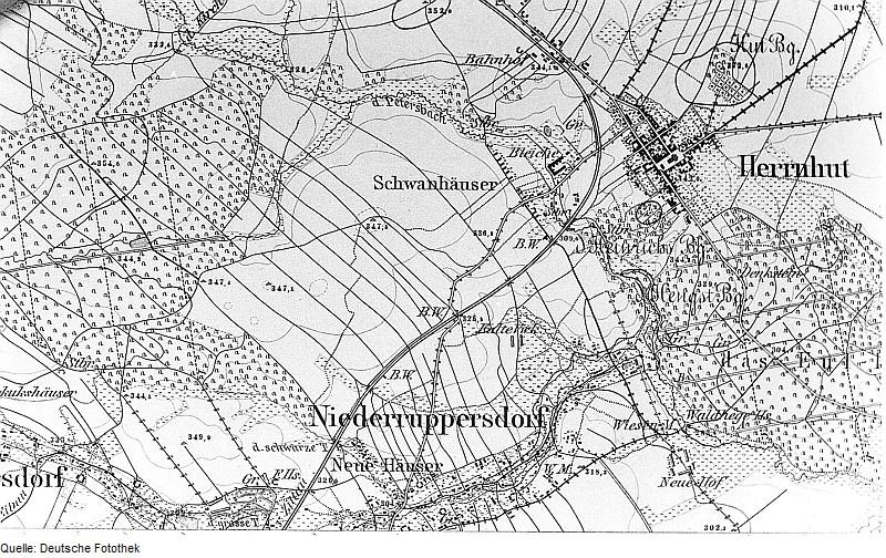 Original image description from the Deutsche FotothekHerrnhut-Ruppersdorf/O.L.. Meßtischblatt, Sekt. Löbau, 1884